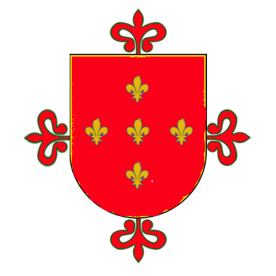 Armas de ZAFORTEZA sobre cruz de Calatrava en atención a descripción facilitada por el Archivo de Casa Formiguera